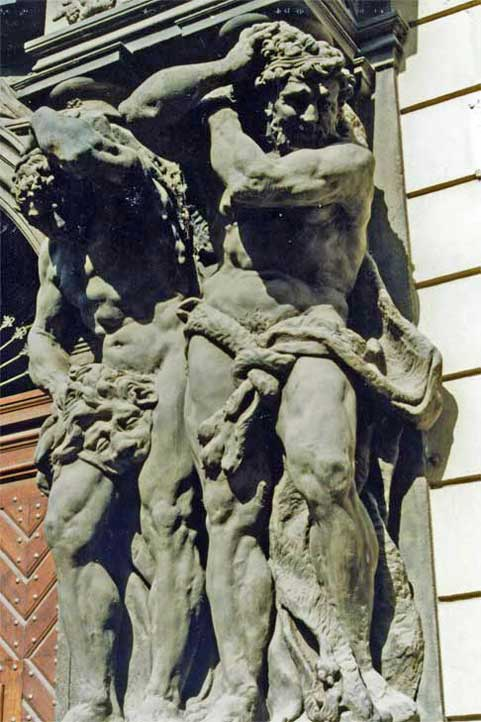 Palais Clam-Gallas, Prague